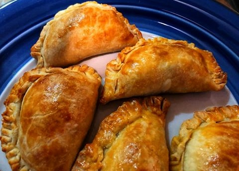 Tradicionales empanadas costarricenses de masa quebrada rellenas con dulce de chiverre, preparadas en las celebraciones típicas de Semana Santa. Imagen tomada por mí, banco de fotos de Turismo AyB, 2017.